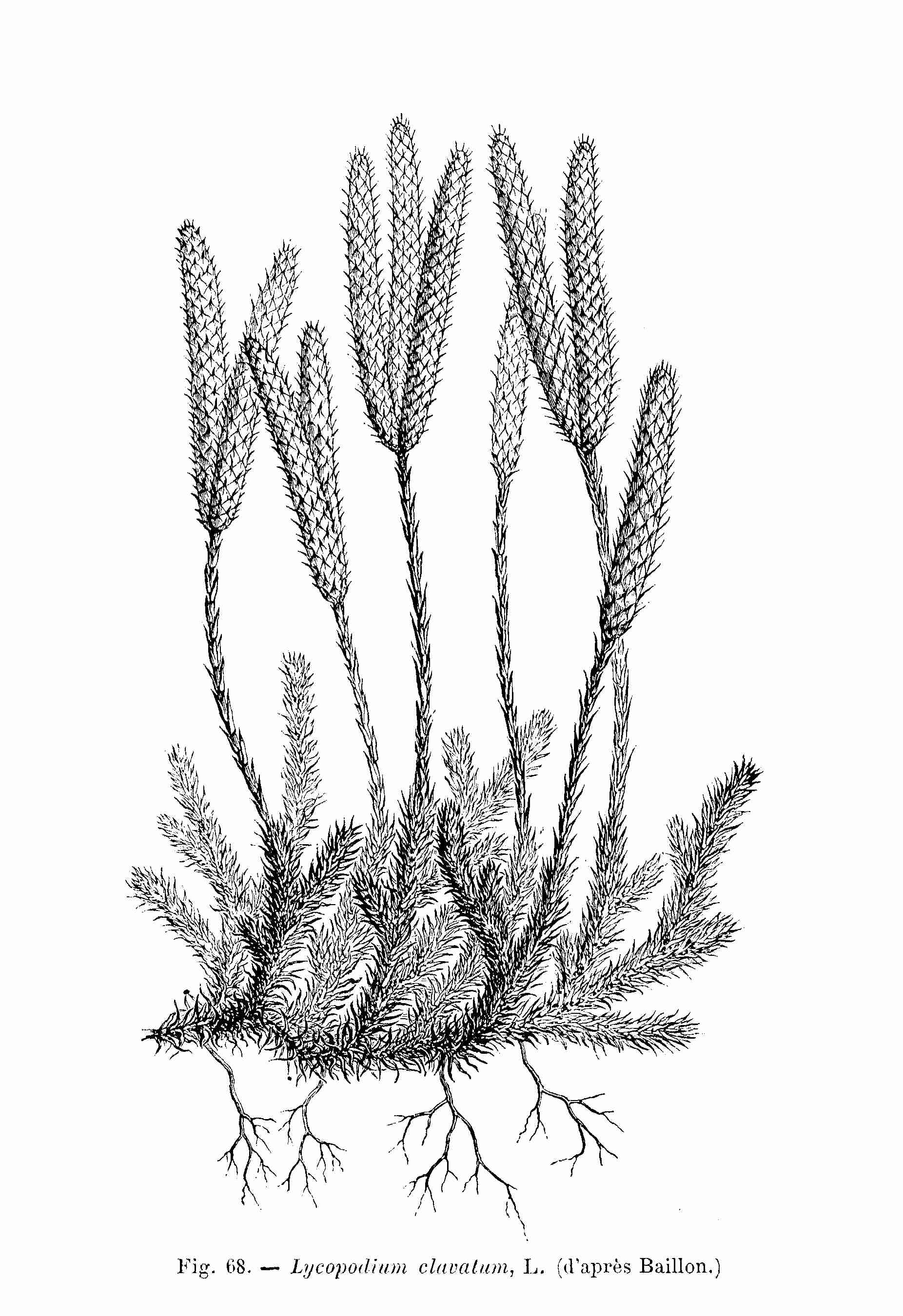 Lycopodium clavatum (dessin)